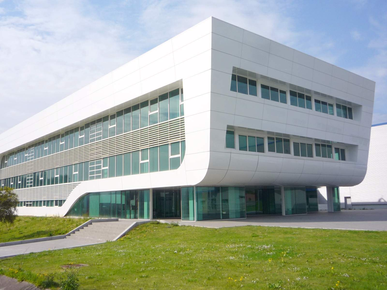 Zamudio - Parque Científico y Tecnológico de Bizkaia - Gestamp Tool Hardening, SL